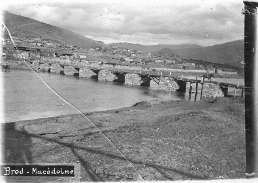 Мост на Черна при Брод през Първата световна война